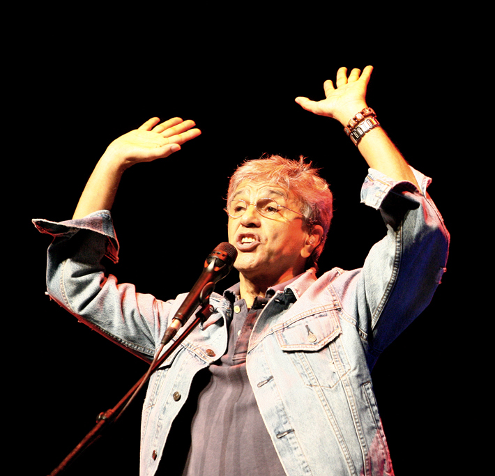 Caetano Veloso no Coliseu de Lisboa